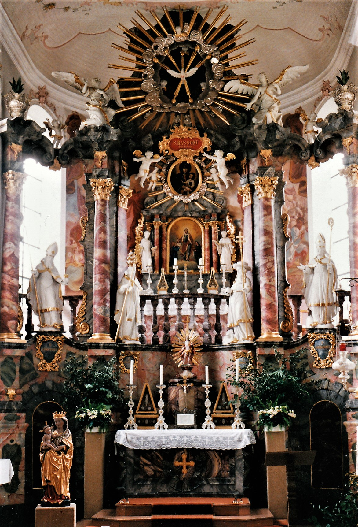 Doppelgeschossiger Hochaltar in St. Rasso (Untergammenried) (Mitte 18. Jh), bei dem der Gnadenaltar im Obergeschoss aus der Zeit um 1714 stammt